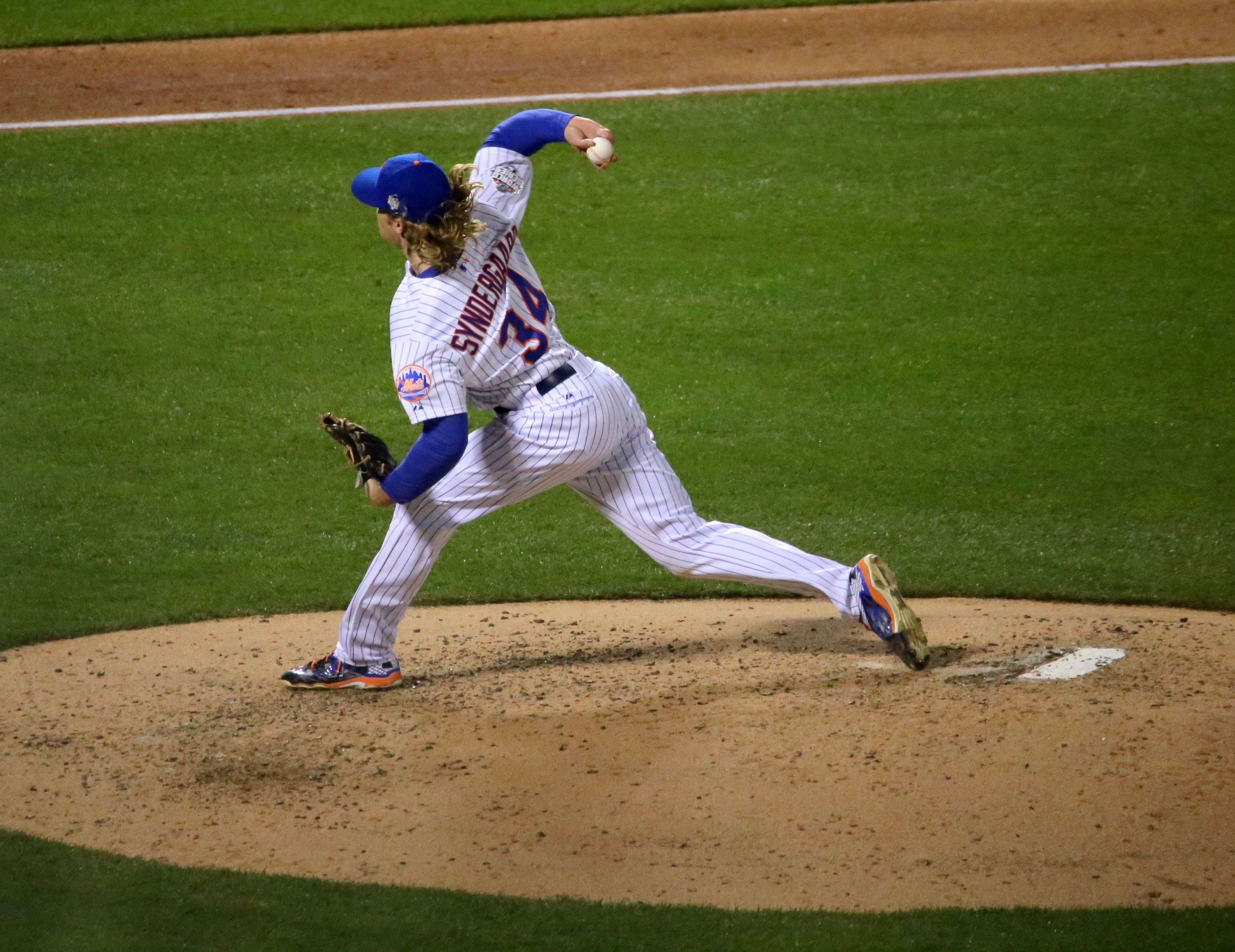 Noah Syndergaard delivers during #WorldSeries Game 3.